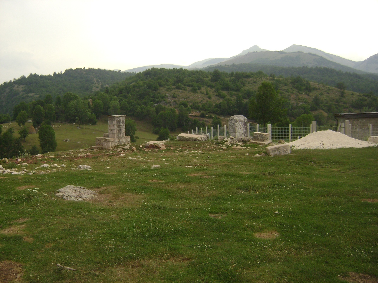 Argud-česma i stečak